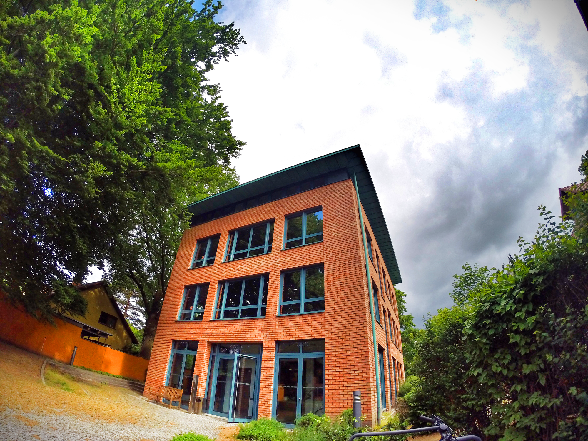 Das Gebäude der ems am Medienstandort Babelsberg